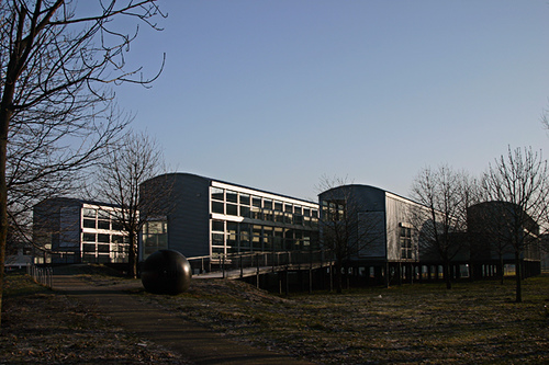 Museum De Paviljoens met kunstwerk (1993) van Marc Ruygrok in Almere